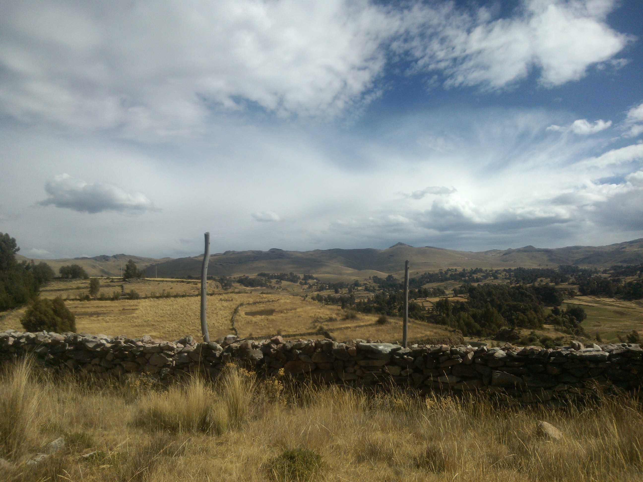 Vista panorámica de una localidad en los andes de peru